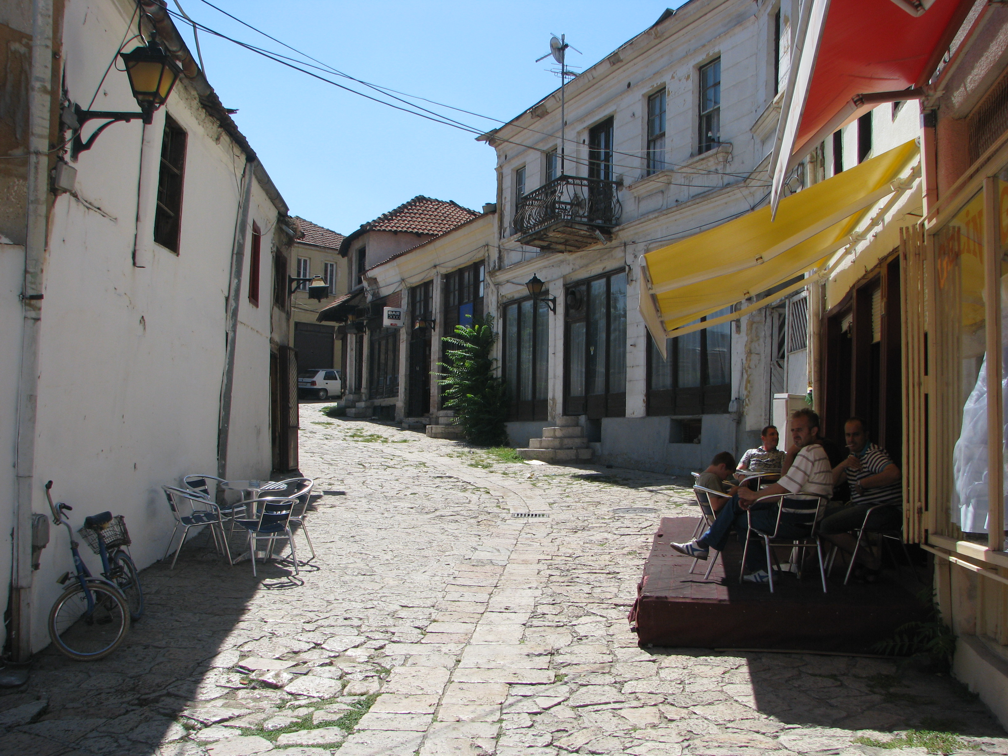 Skopje old town